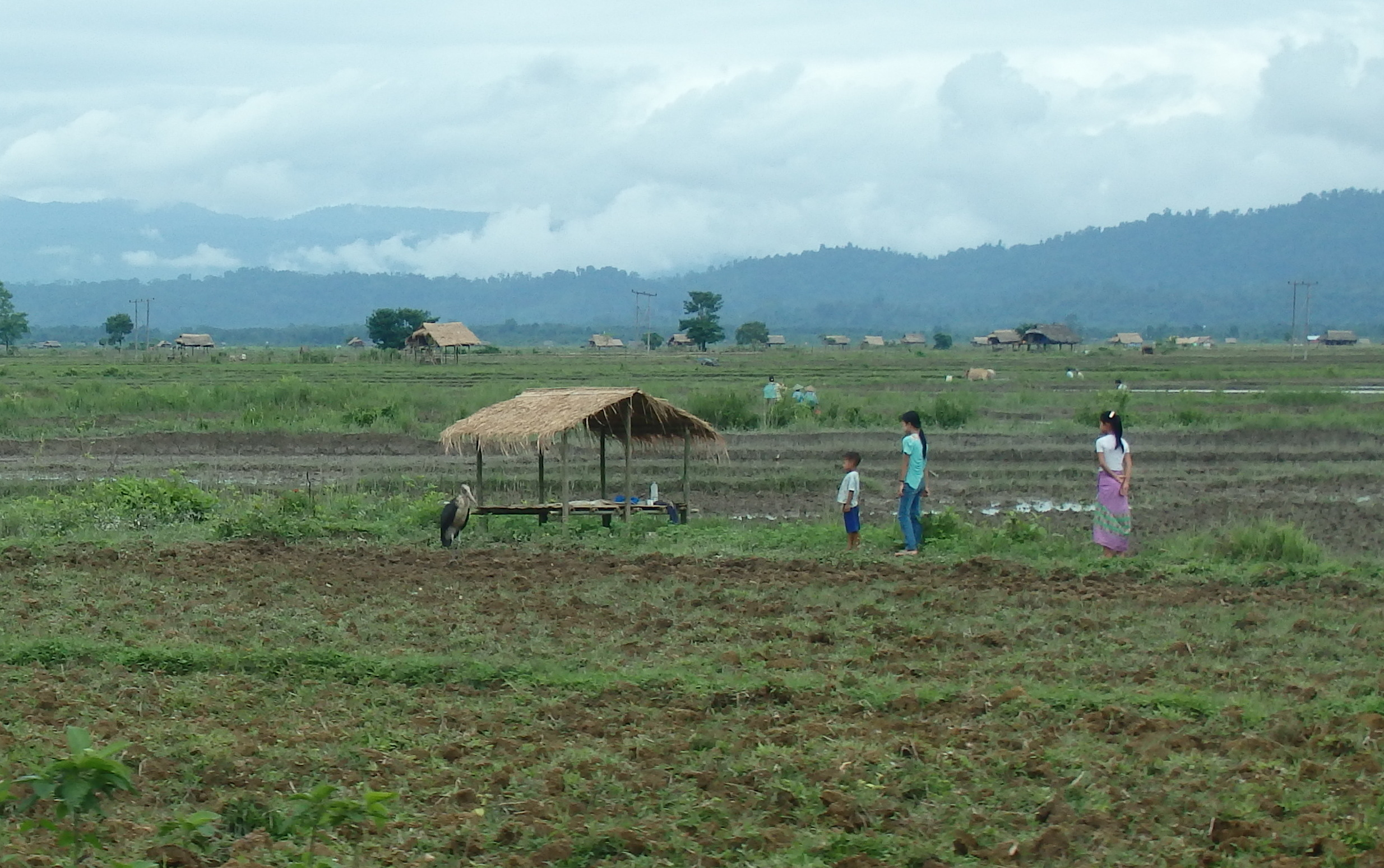 Big Bird